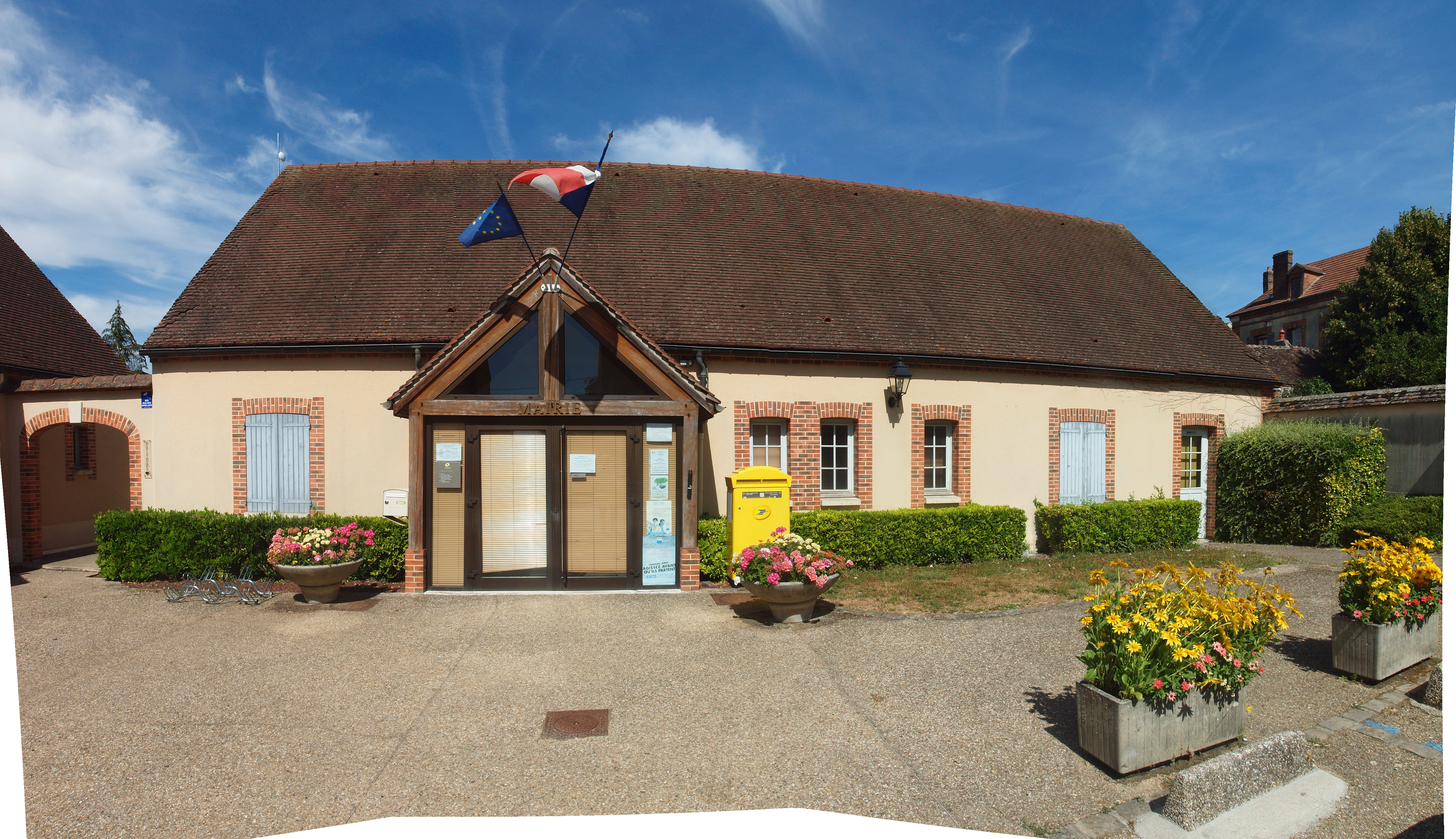 Mairie de Thorigny-sur-Oreuse (Yonne, France)